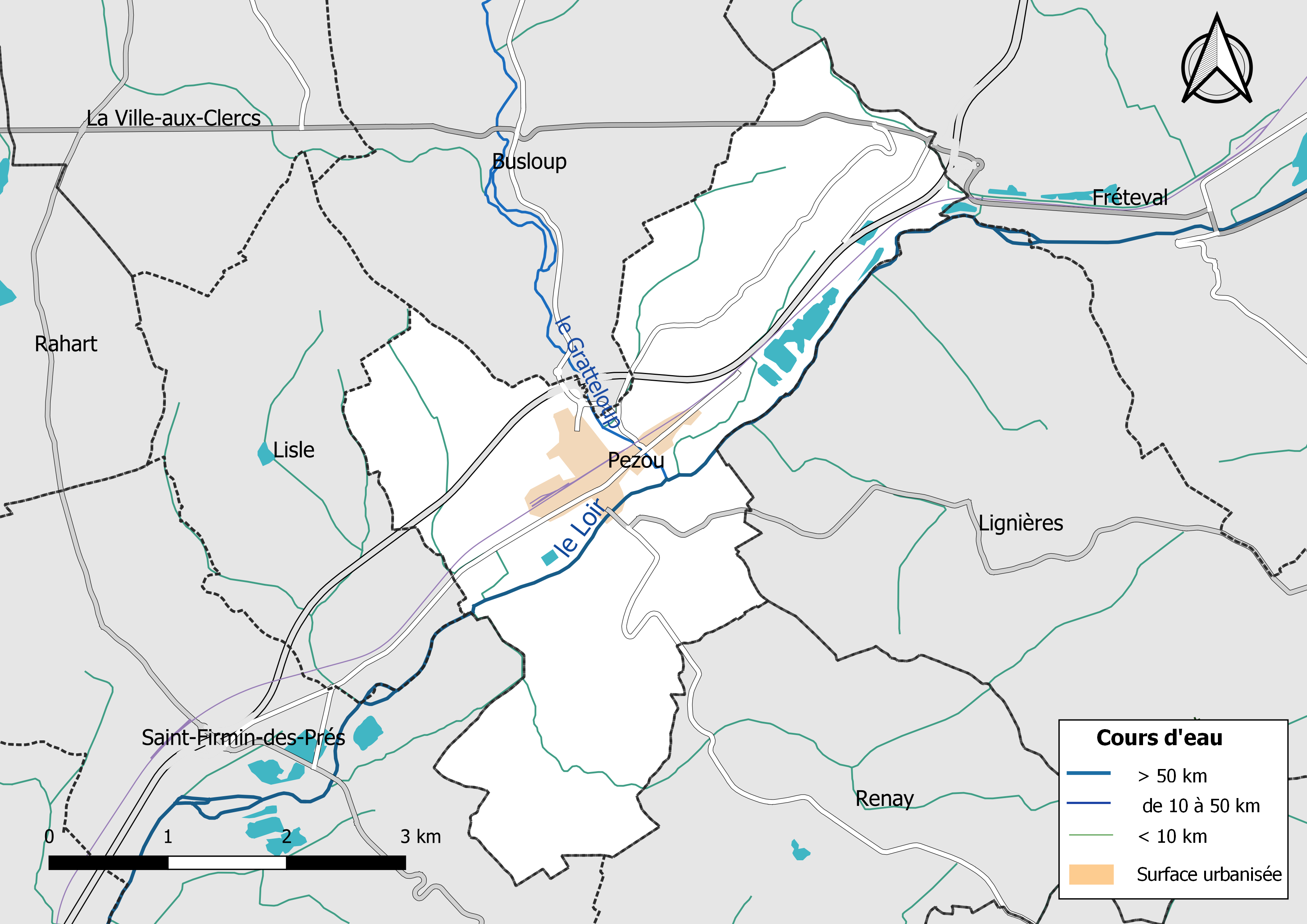 Carte du réseau hydrographique de la commune de Pezou (Loir-et-Cher, France).